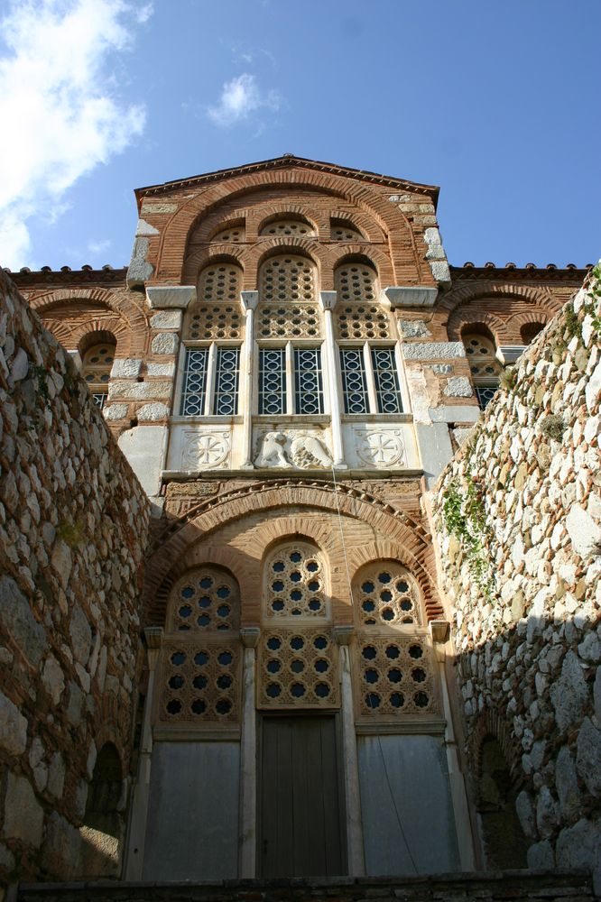 Monastère d'Osios Loukas (Grèce)